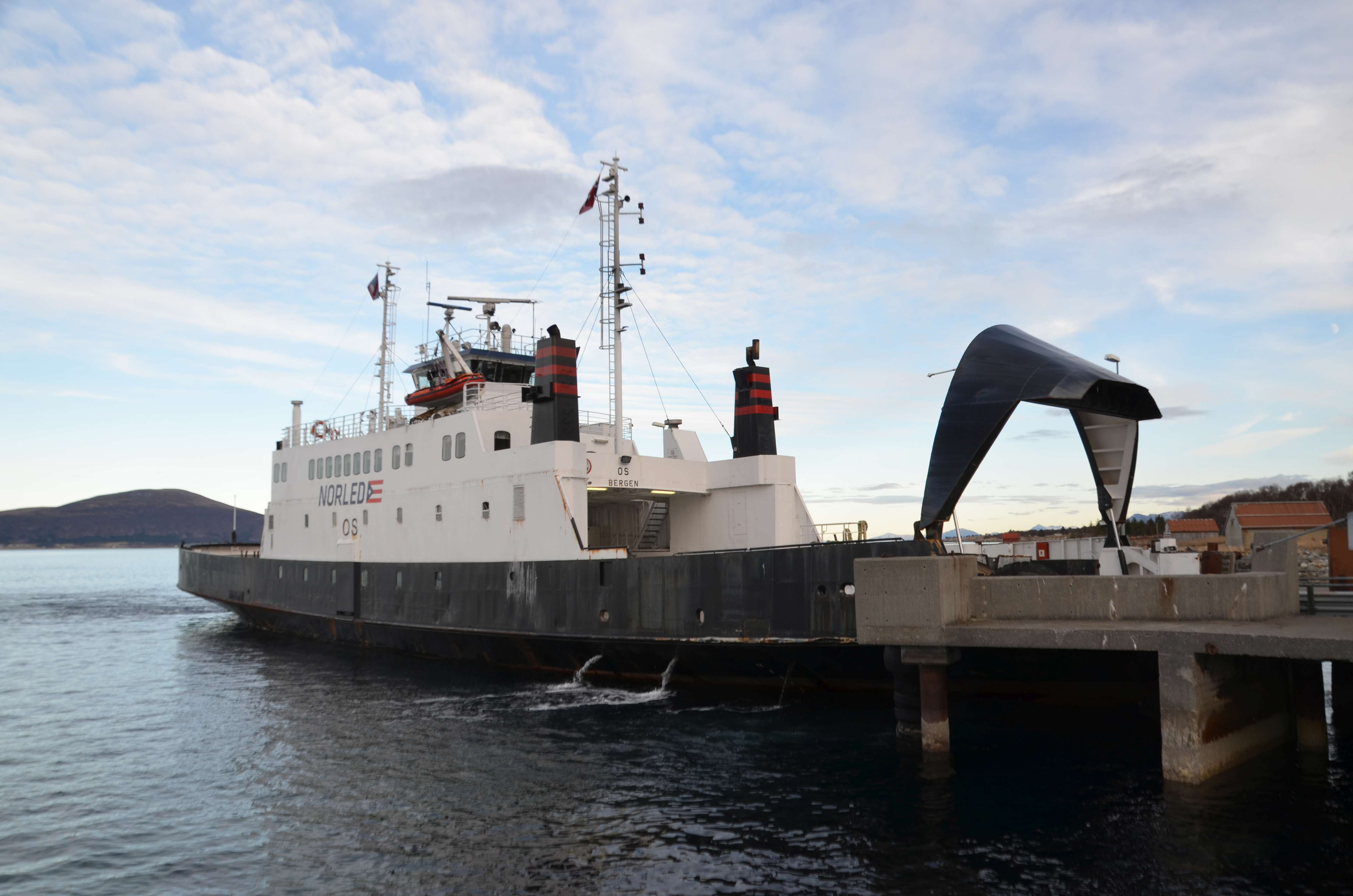 Austnes - Skjelten